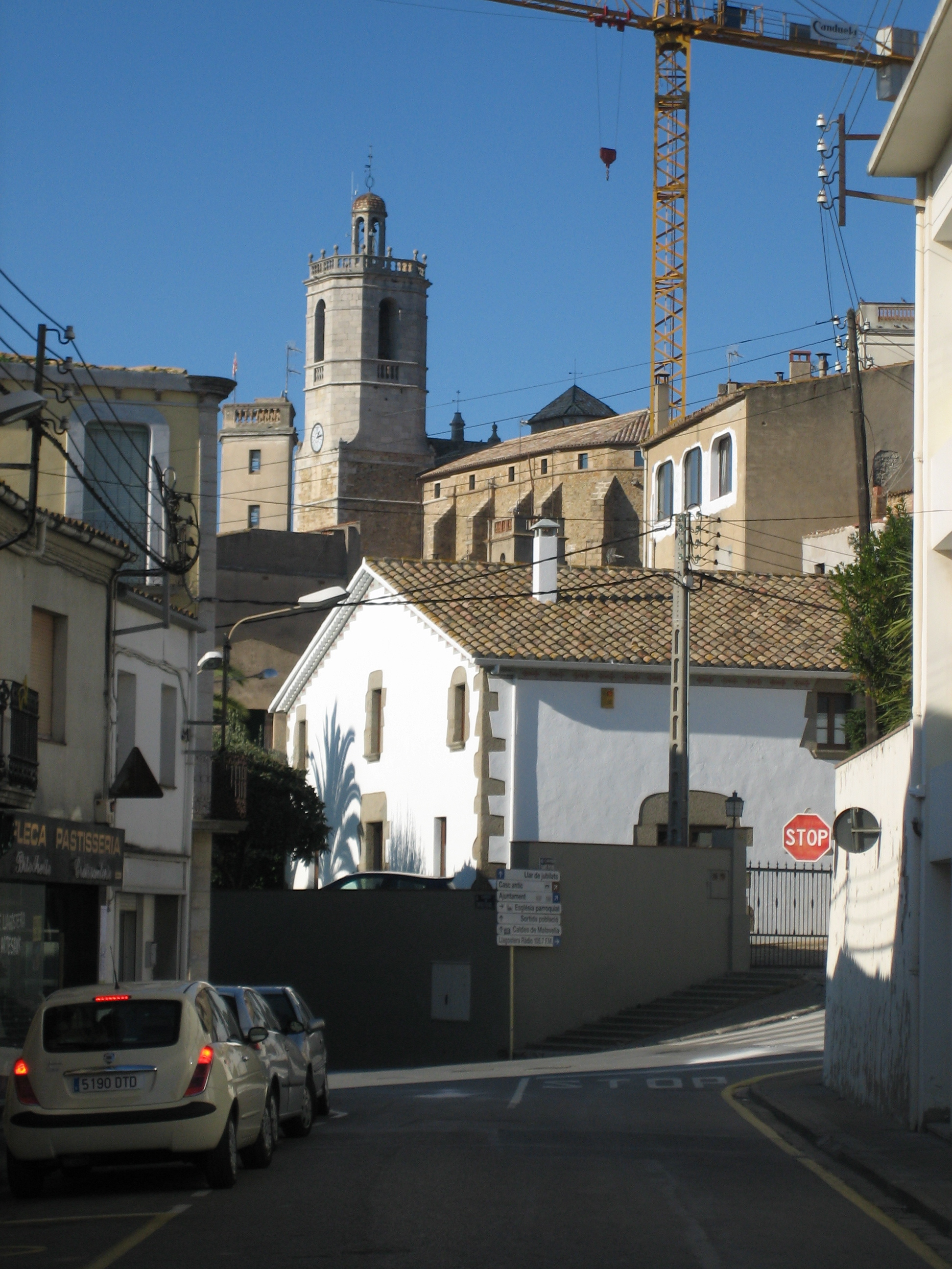 Carrer de Joan Maragall de Llagostera